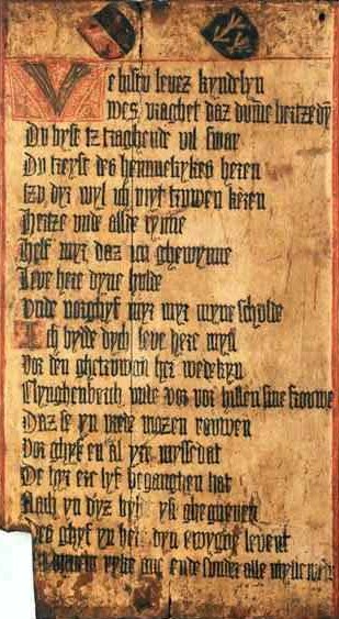 Fürbitttafel des Lübecker Ratsherrn Wedekin Klingenberg und seiner Ehefrau Hildegund, ehemals in der Lübecker Marienkirche, heute St. Annen Museum, Lübeck